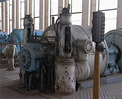 Zoelly-féle turbina egy része. Kelenföldi Hőerőmű központi terme (11. kerület). Láng-gyár terméke? (13. kerület?)